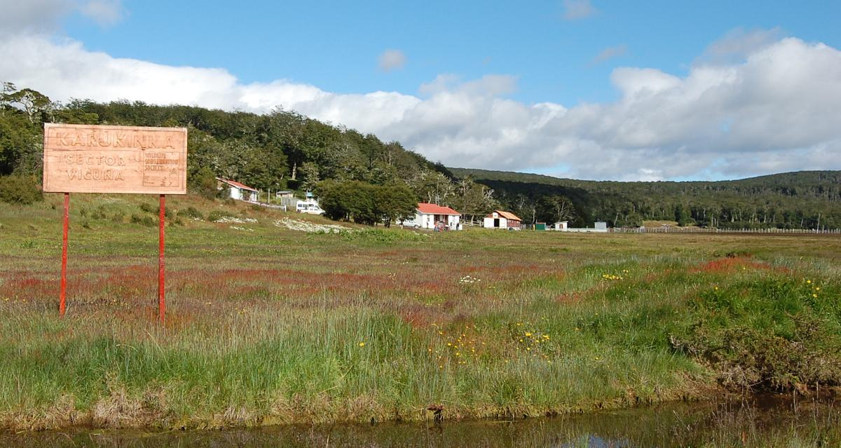 Parque Karukinka, Sector Vicuña, Tierra del Fuego, Región de Magallanes, Chile.